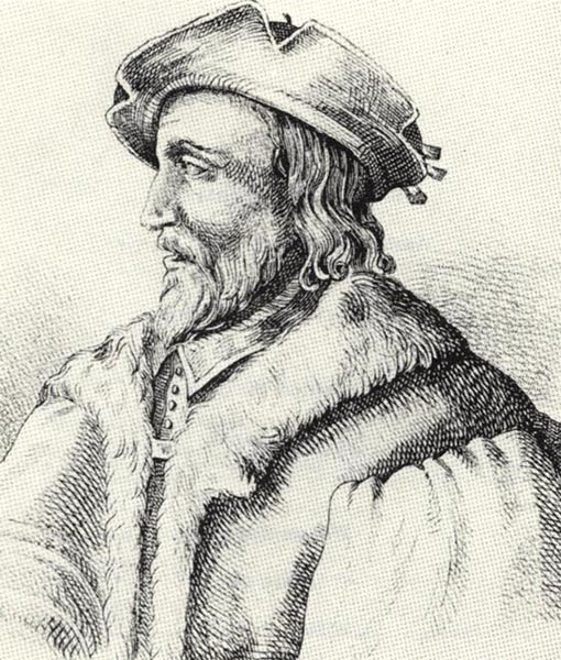 Balthasar Hubmaier (1480-1528)